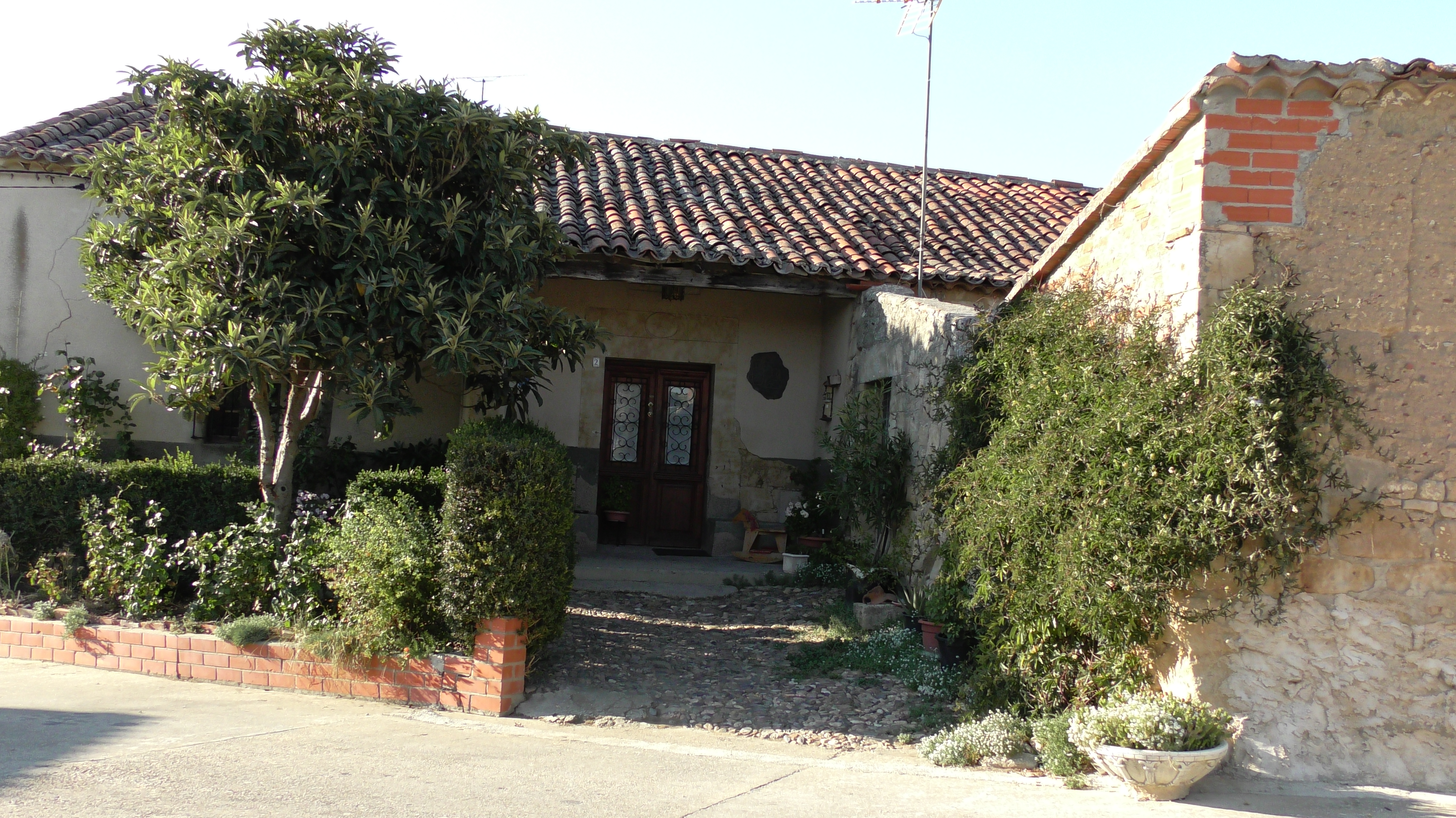 Fuentespreadas